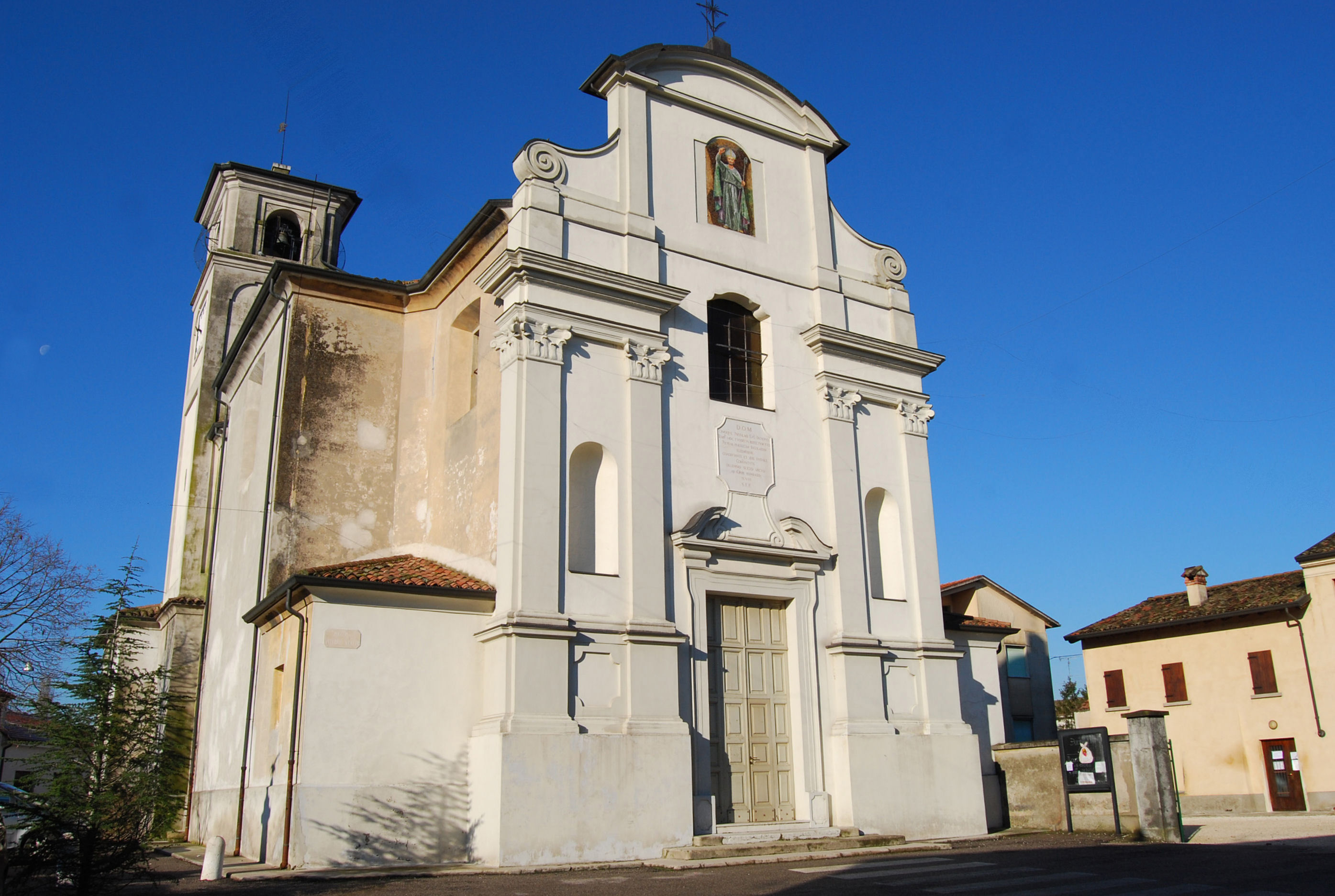 Cereta, chiesa parrocchiale di S. Nocolò.